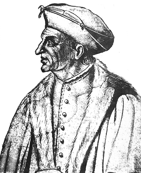 Potrait Giovanni Manardi